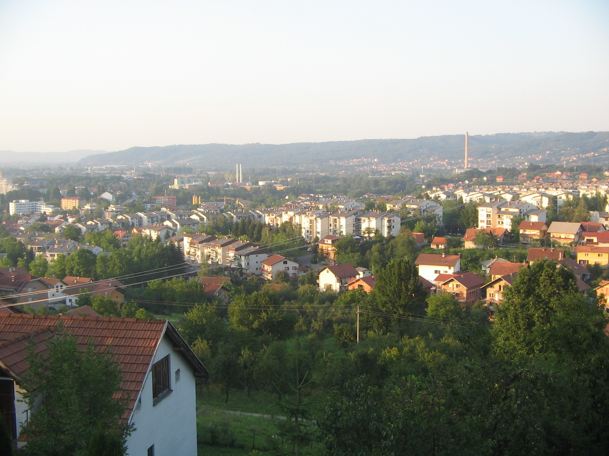 Starčevica